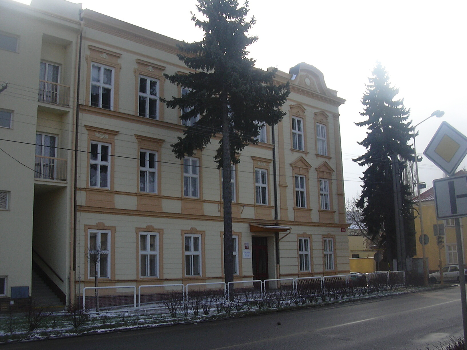 Základní škola (Ivanovice na Hané- Czech republic)